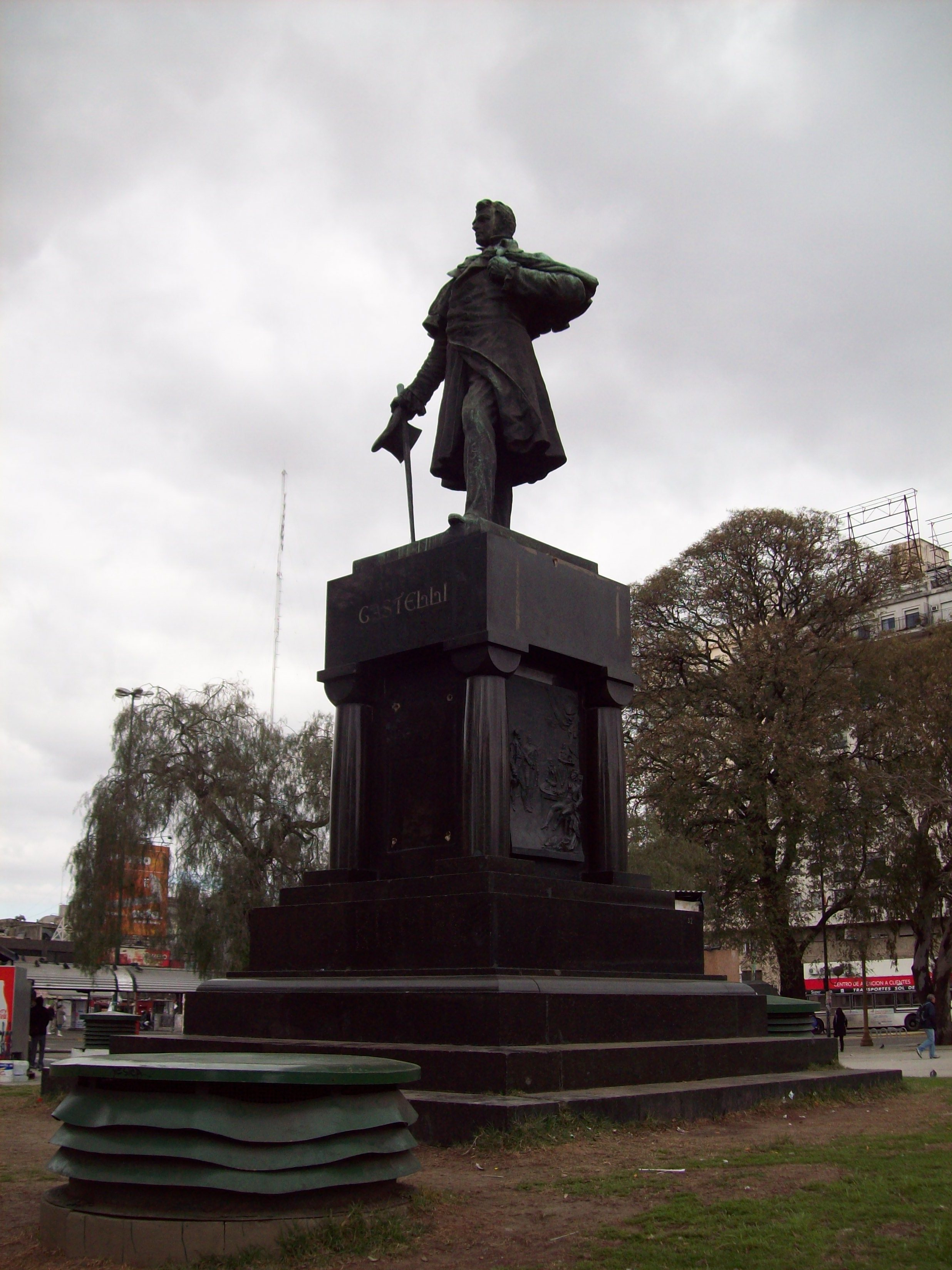 Juan José Castelli, obra de Gustavo Eberlein, en Plaza Constitución, Buenos Aires.